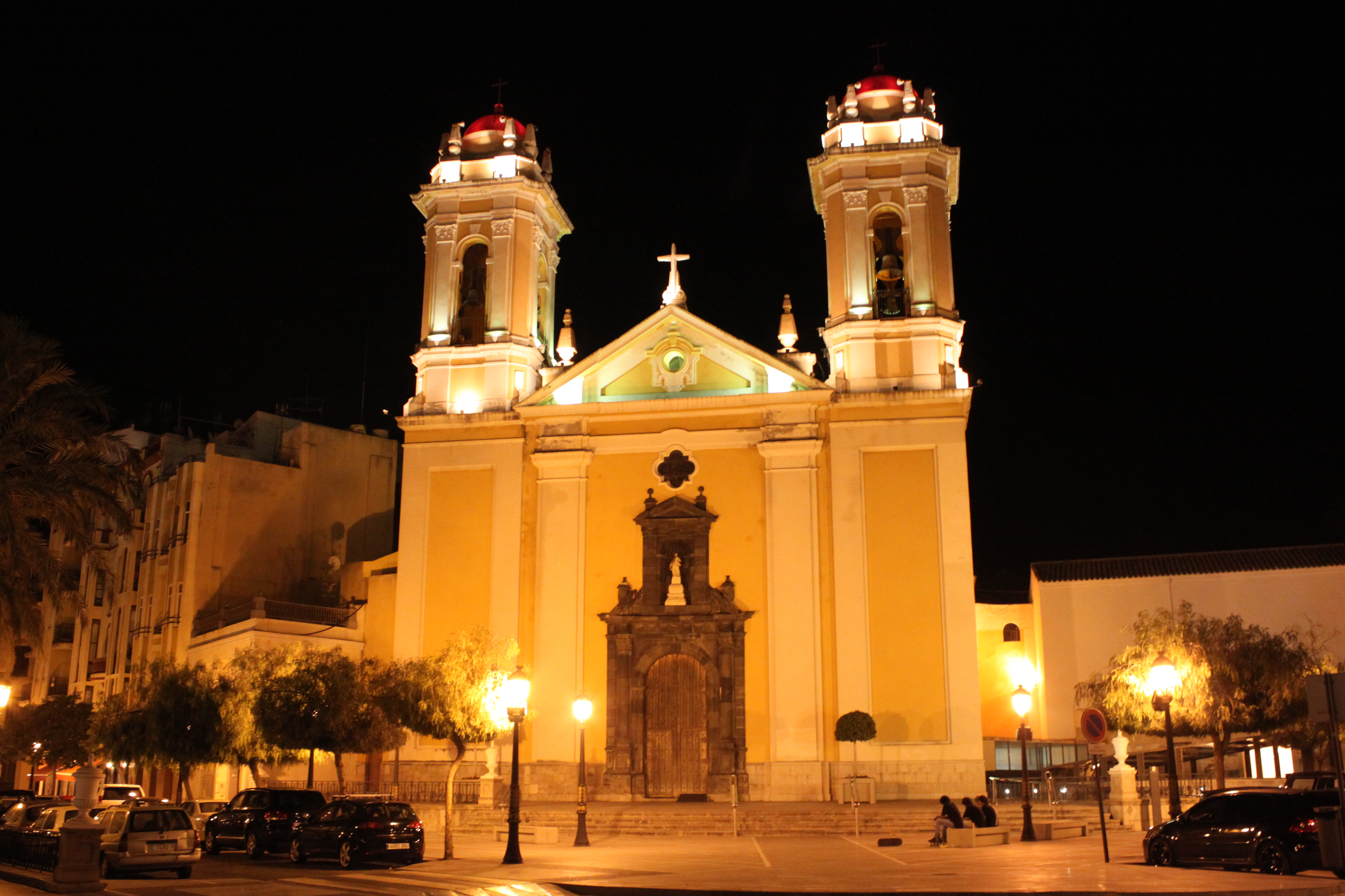 Catedral de Ceuta, de noche